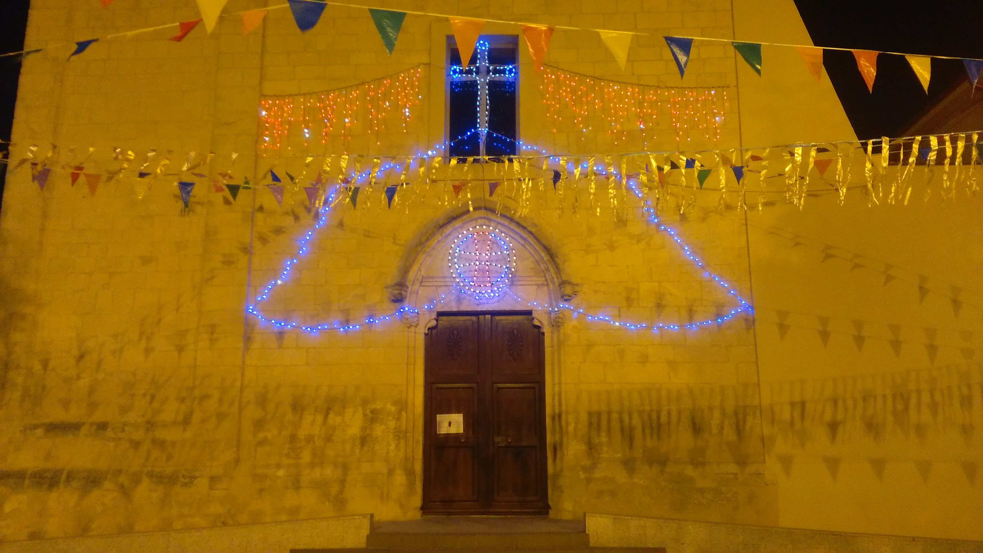 La chiesa di San Biagio di Villasor addobbata per la festa di Santa Vitalia